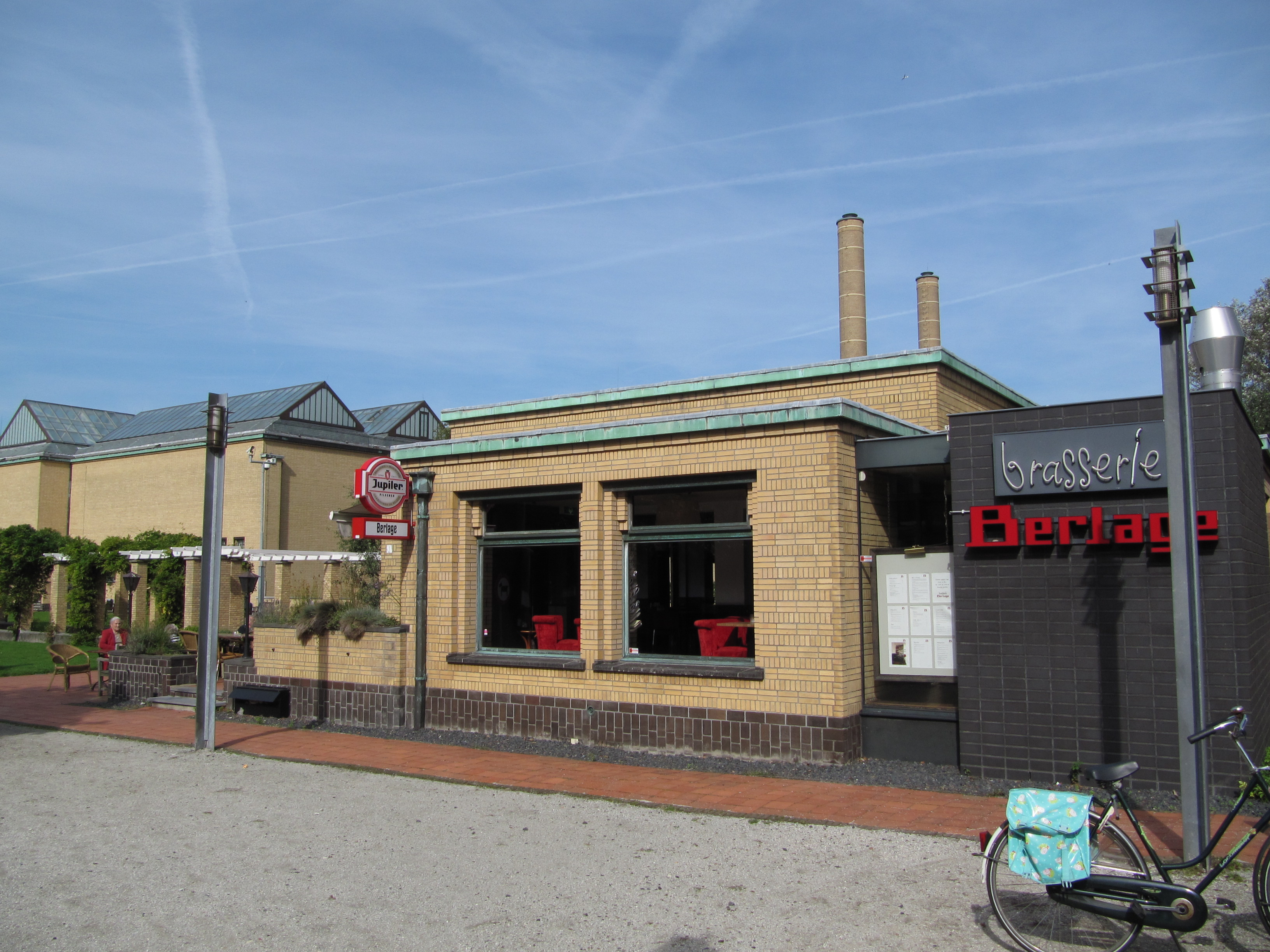 Zicht op een deel van het Kunstmuseum Den Haag, Stadhouderslaan 41 in Den Haag (1).jpg